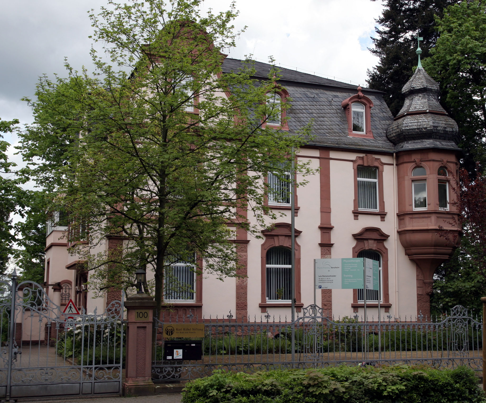 Das unter Denkmalschutz stehende Haus Nr. 100 in der Darmstädter Straße der Stadt Bensheim